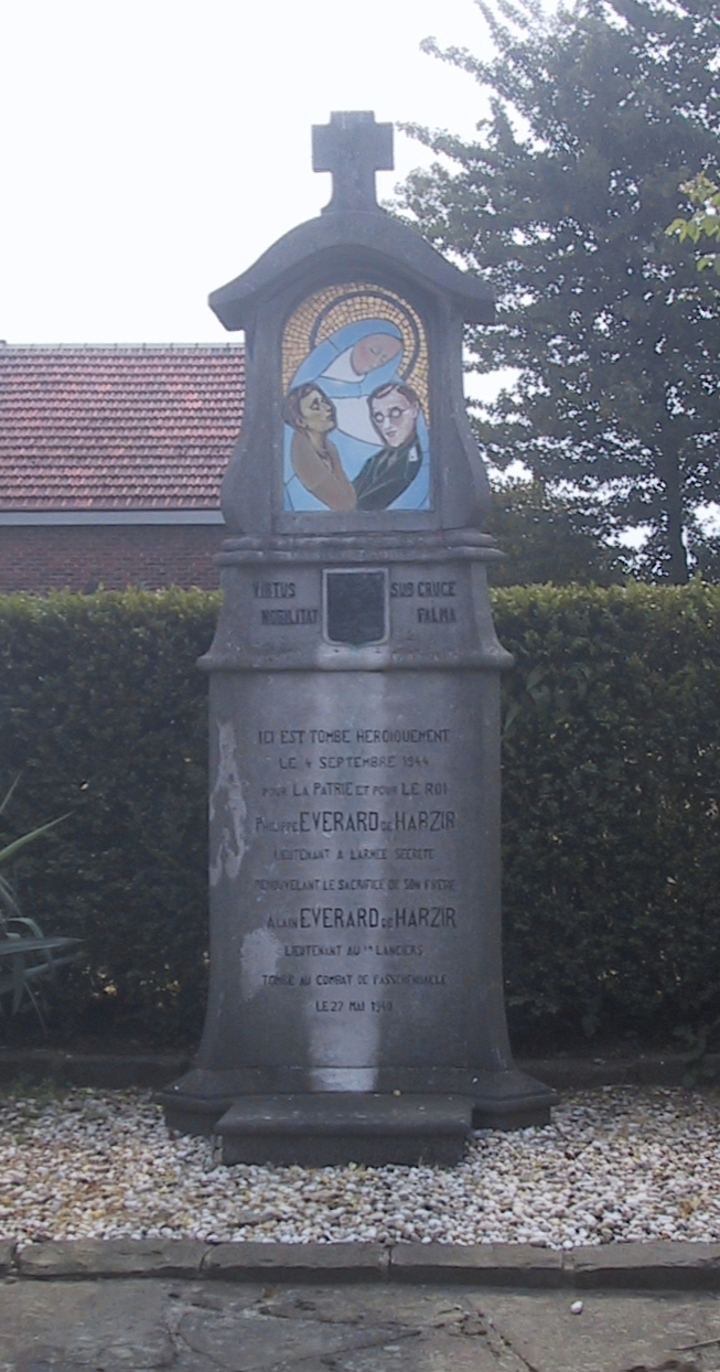 Monument aux deux frères Everard de Harzir en 1940 et 1944